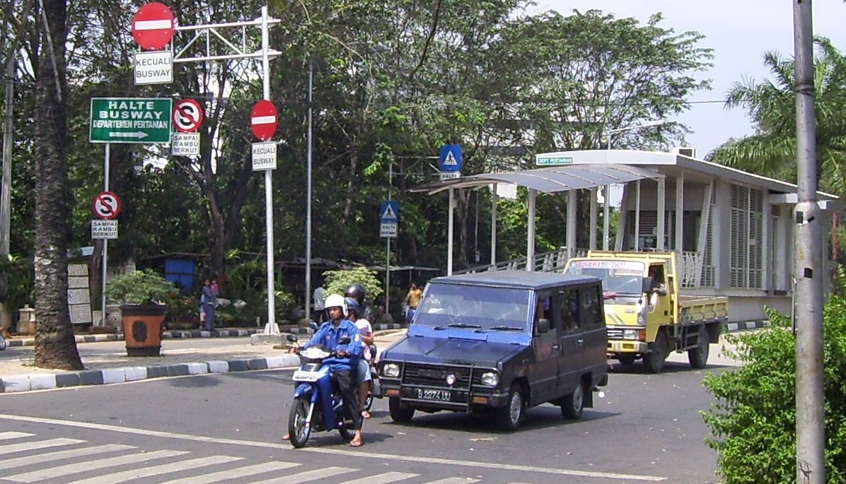 Halte busway pertanian south jakarta